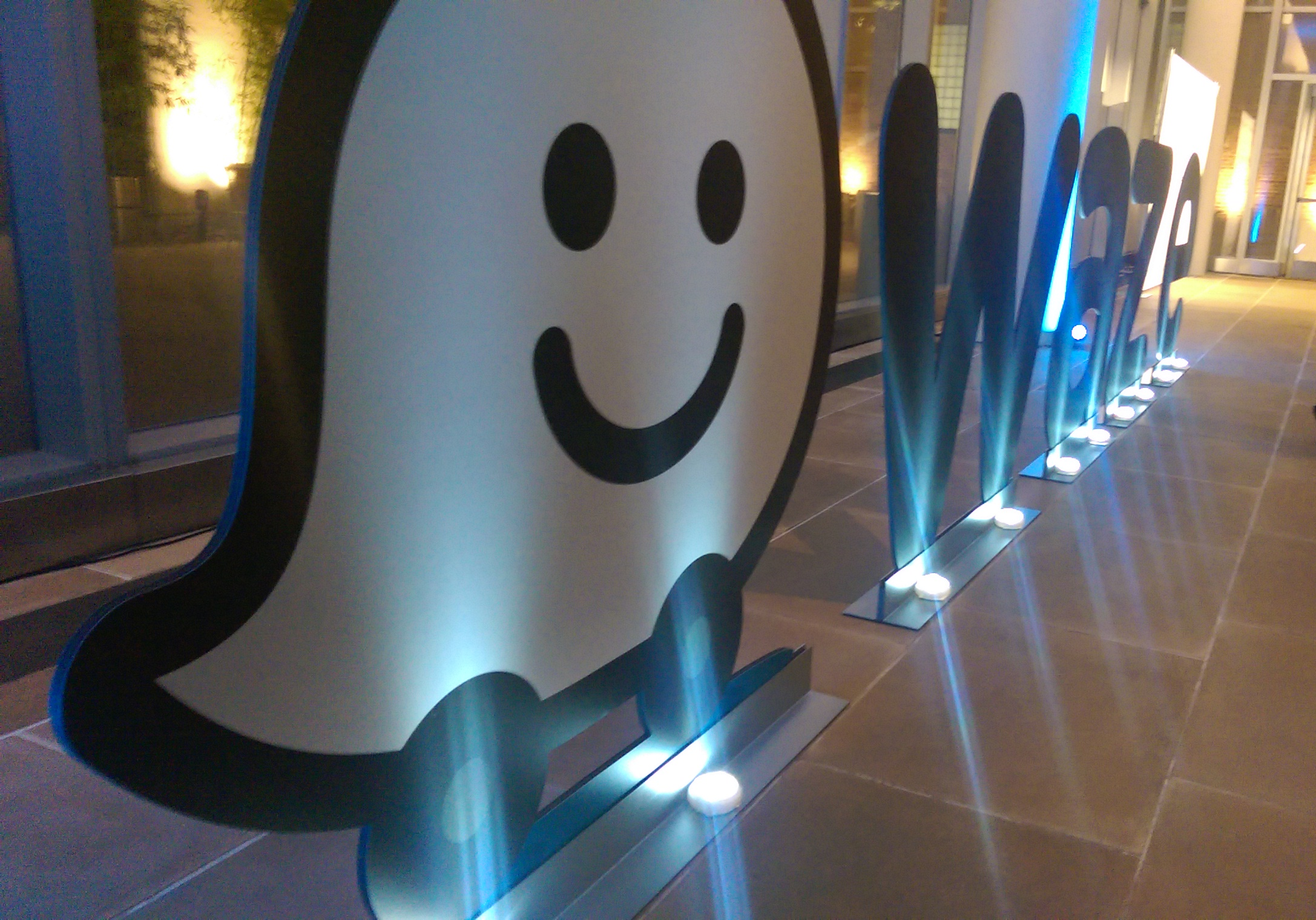 Waze W10 Event, New York